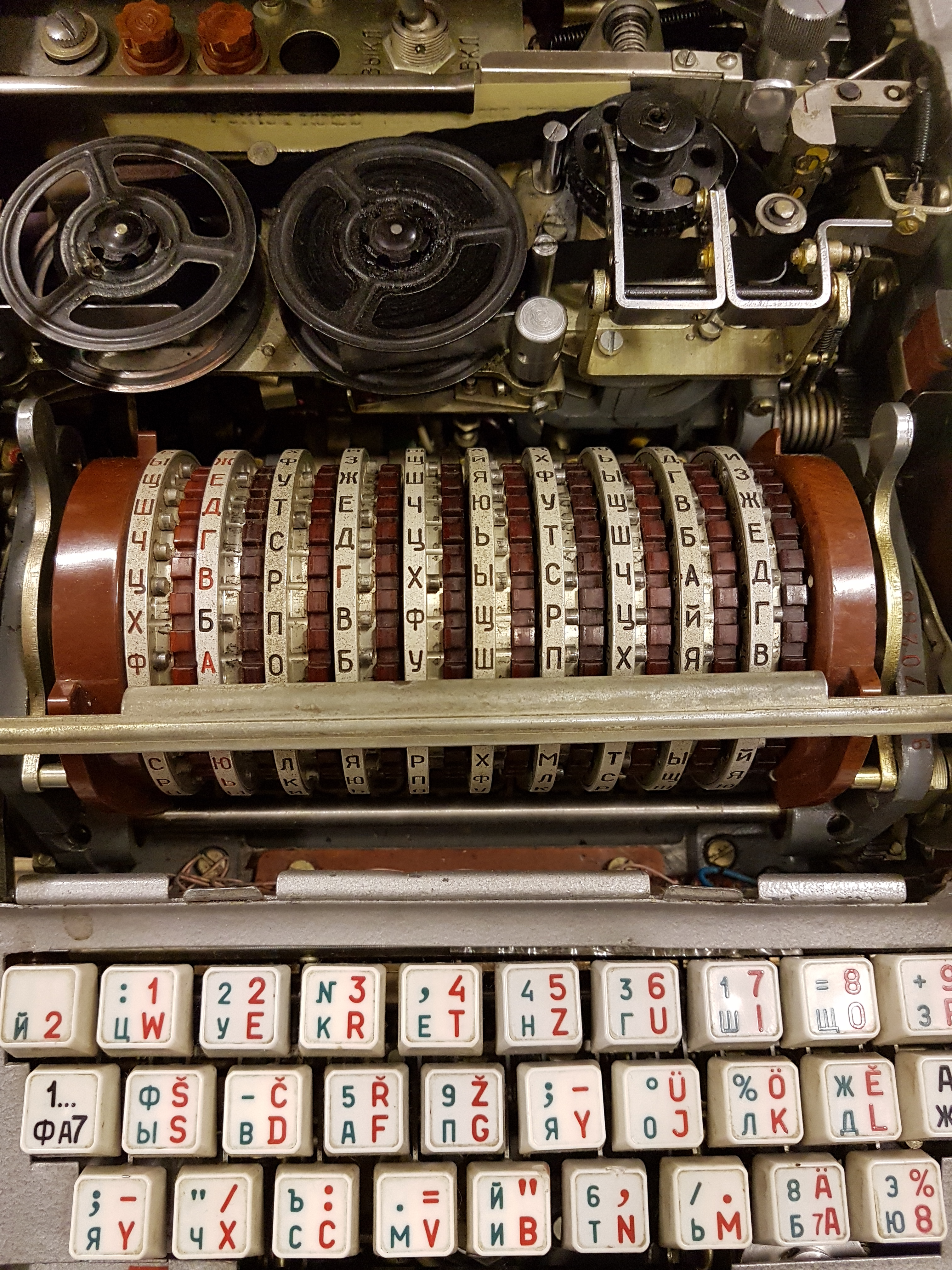 Russisches Rotor-Verschlüsselungsgerät Fialka, Detail. Heeresgeschichtliches Museum Wien, 2018